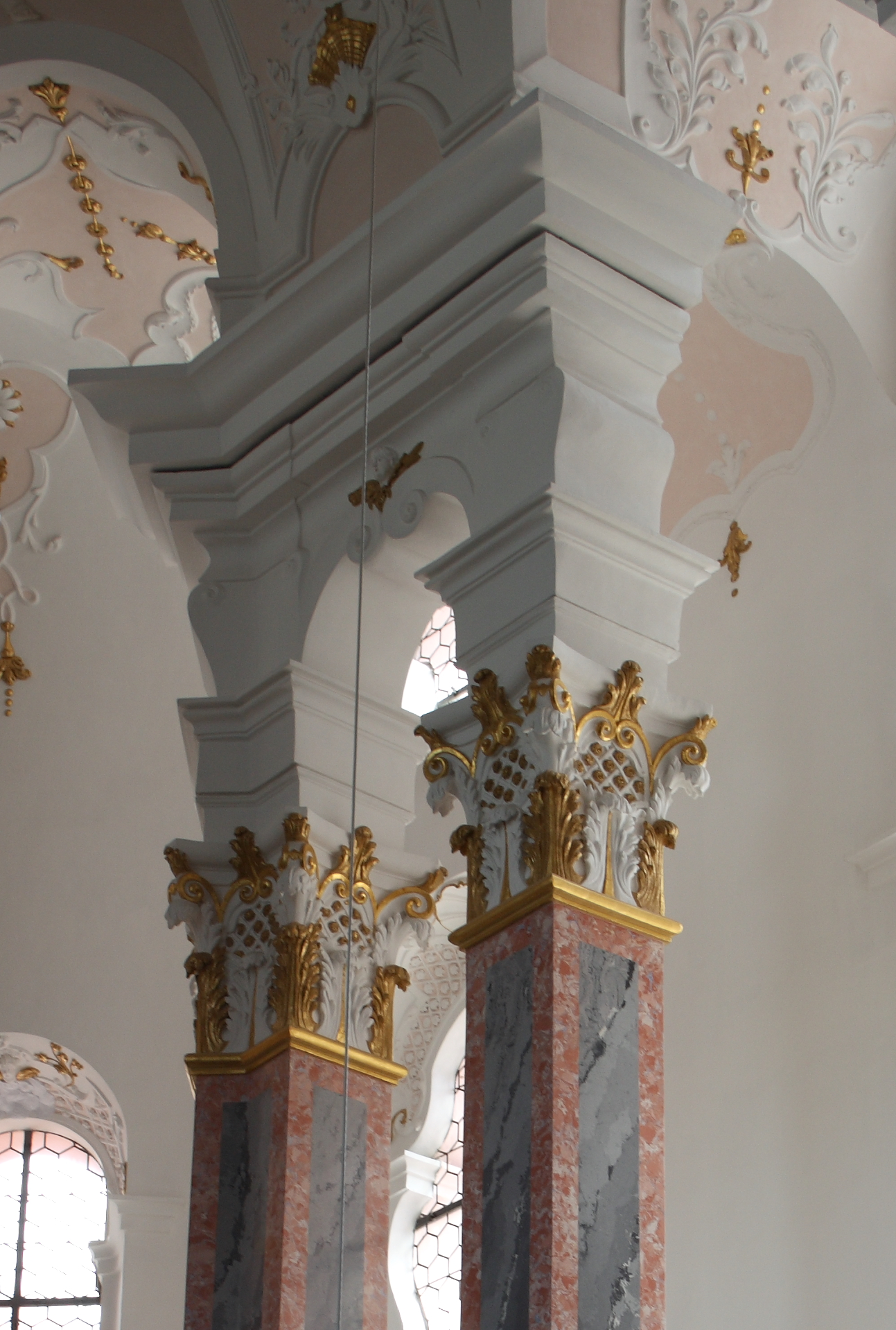 Katholische Kirche Zu Unserer Lieben Frau in Günzburg (Bayern), 1736-1741 von Dominikus Zimmermann gebaut, Pfeiler mit Kapitellen